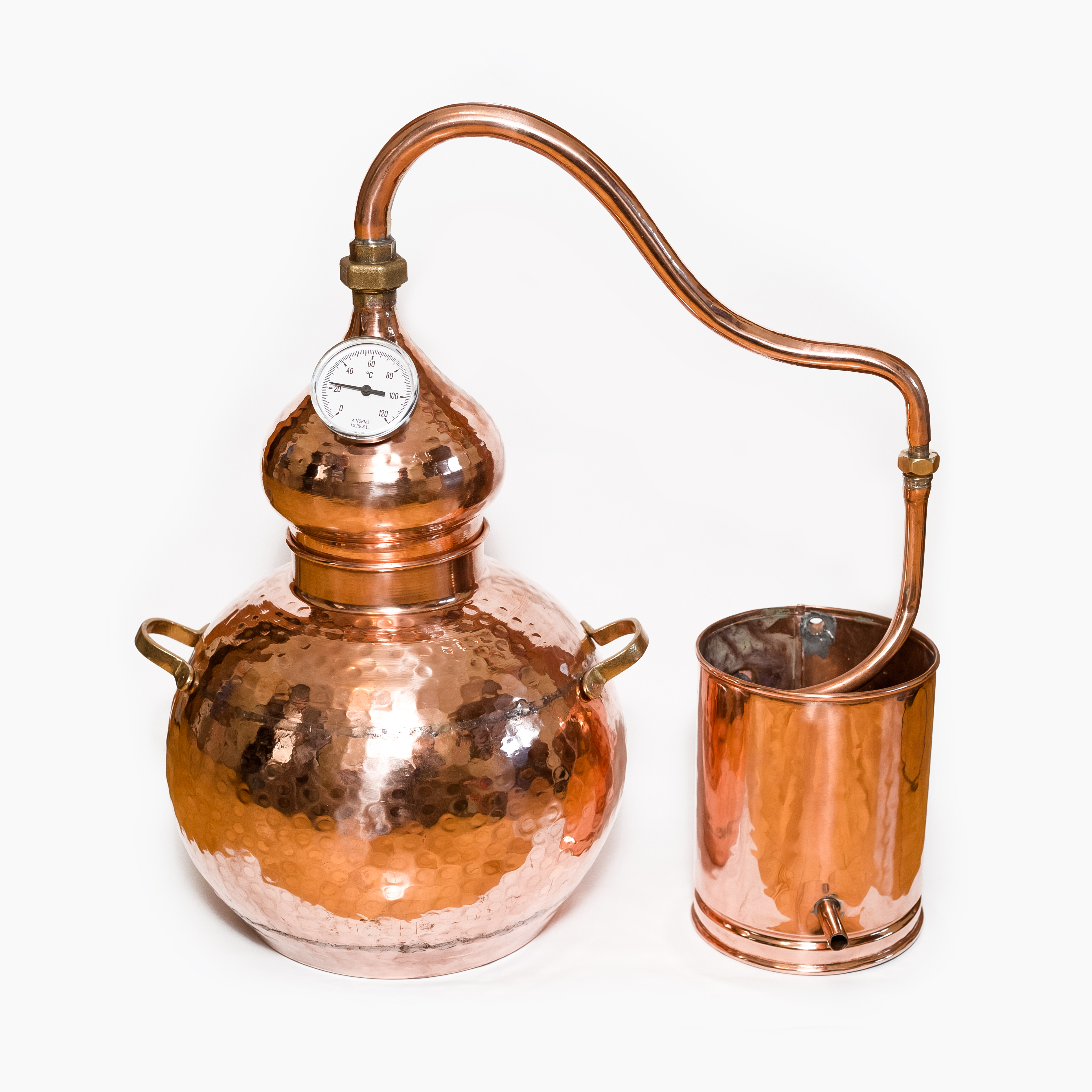 Аламбік классичний Португальский мідний ручноі роботи